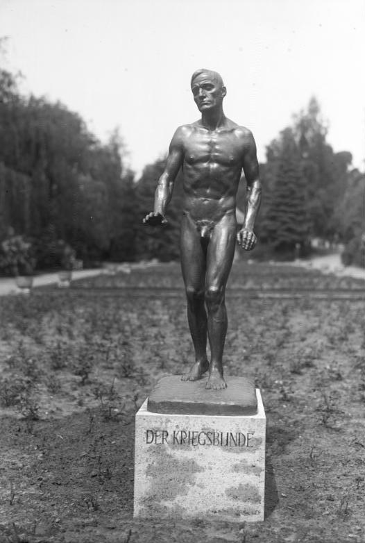 Das erste Denkmal für die Kriegsblinden! In den Parkanlagen am Fichteberg in Berlin-Steglitz unweit der Staatl. Blinden-Ausbildungsanstalt, ist ein Denkmal der Kriegsblinden aufgestellt worden. Der Schöpfer des Denkmals ist Prof. Lewin Funke aus Dahlem bei Berlin.